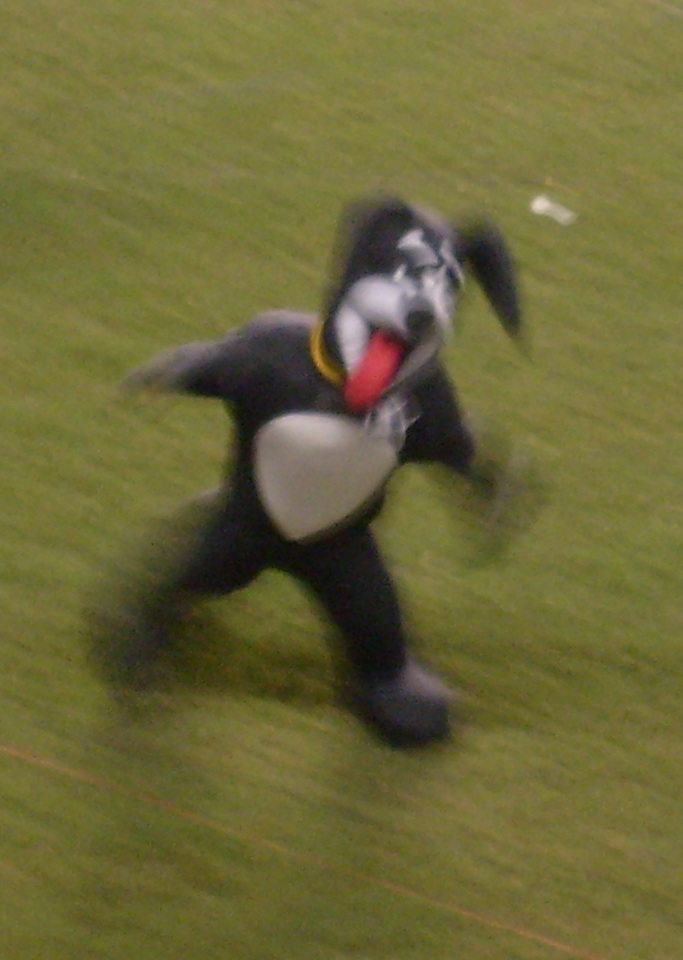 Versão 2008 da mascote Biriba, do Botafogo de Futebol e Regatas. Representado por um boneco canino.